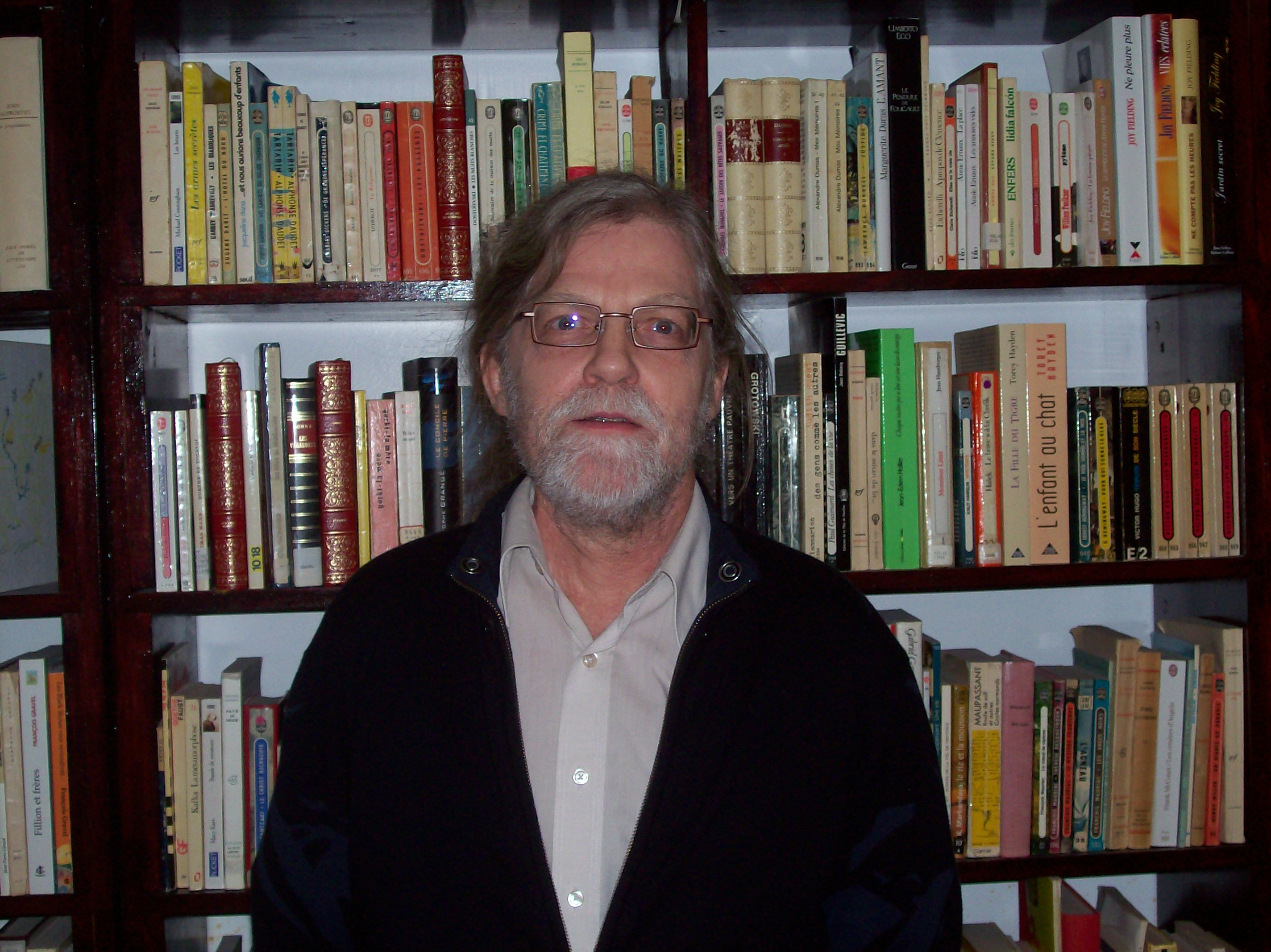 Le fondateur de la bibliothèque numérique Les Classiques des sciences sociales Jean-Marie Tremblay dans le sous-sol de sa demeure.